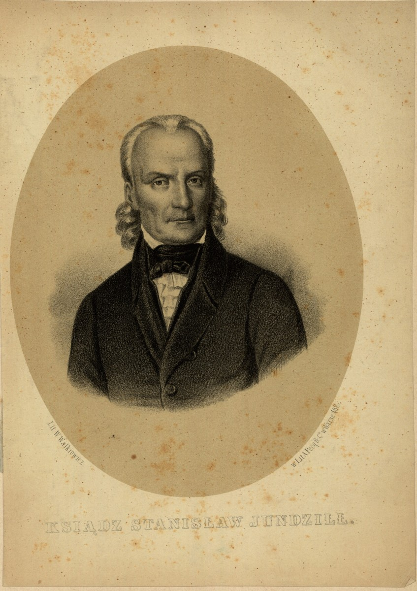 Беларуская (тарашкевіца): Партрэт Станіслава Юндзіла (Stanisłaŭ Jundził)